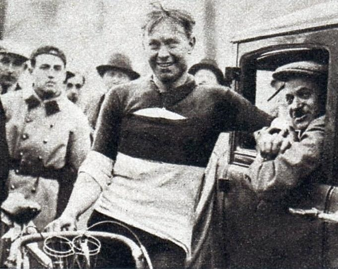 Le Belge Alphons Schepers, vainqueur de la première édition de Paris-Nice, en mars 1933.